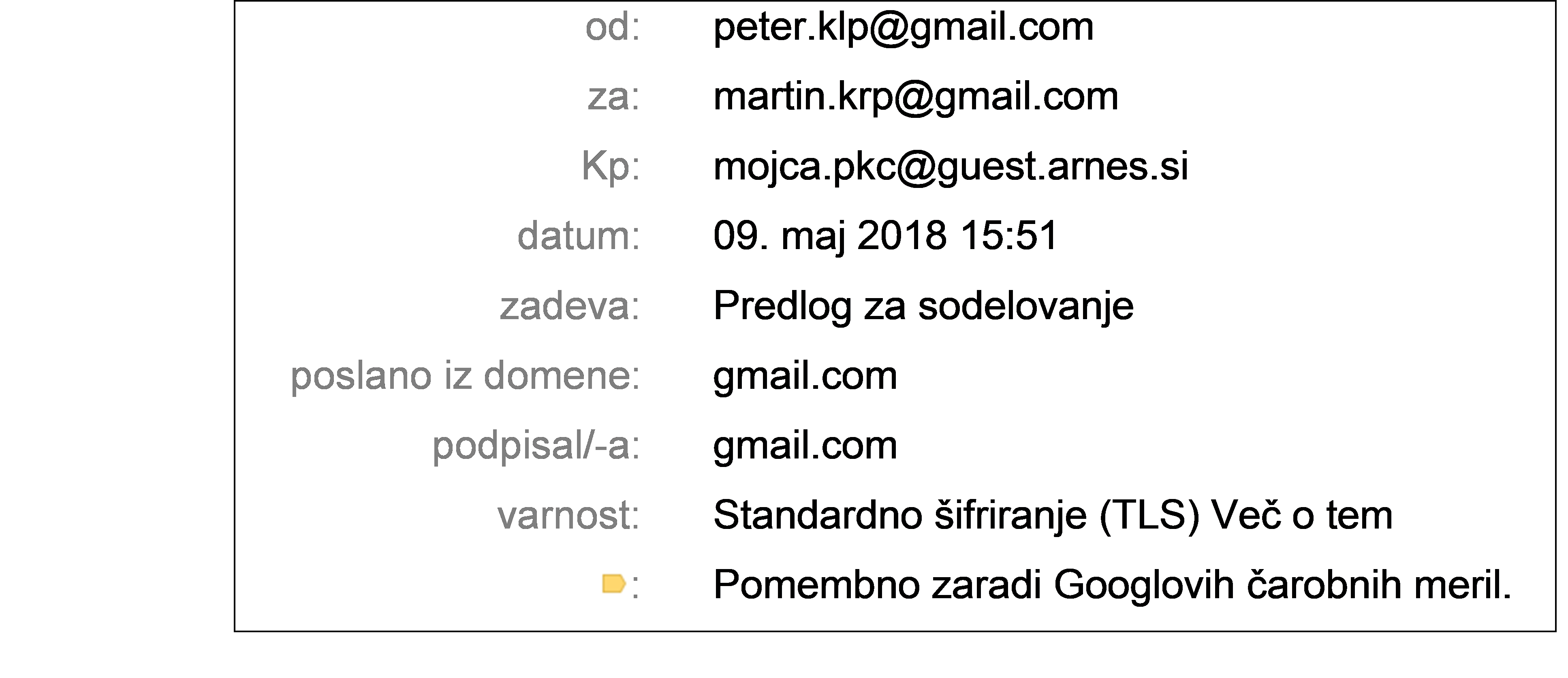 Sestava e-sporočila